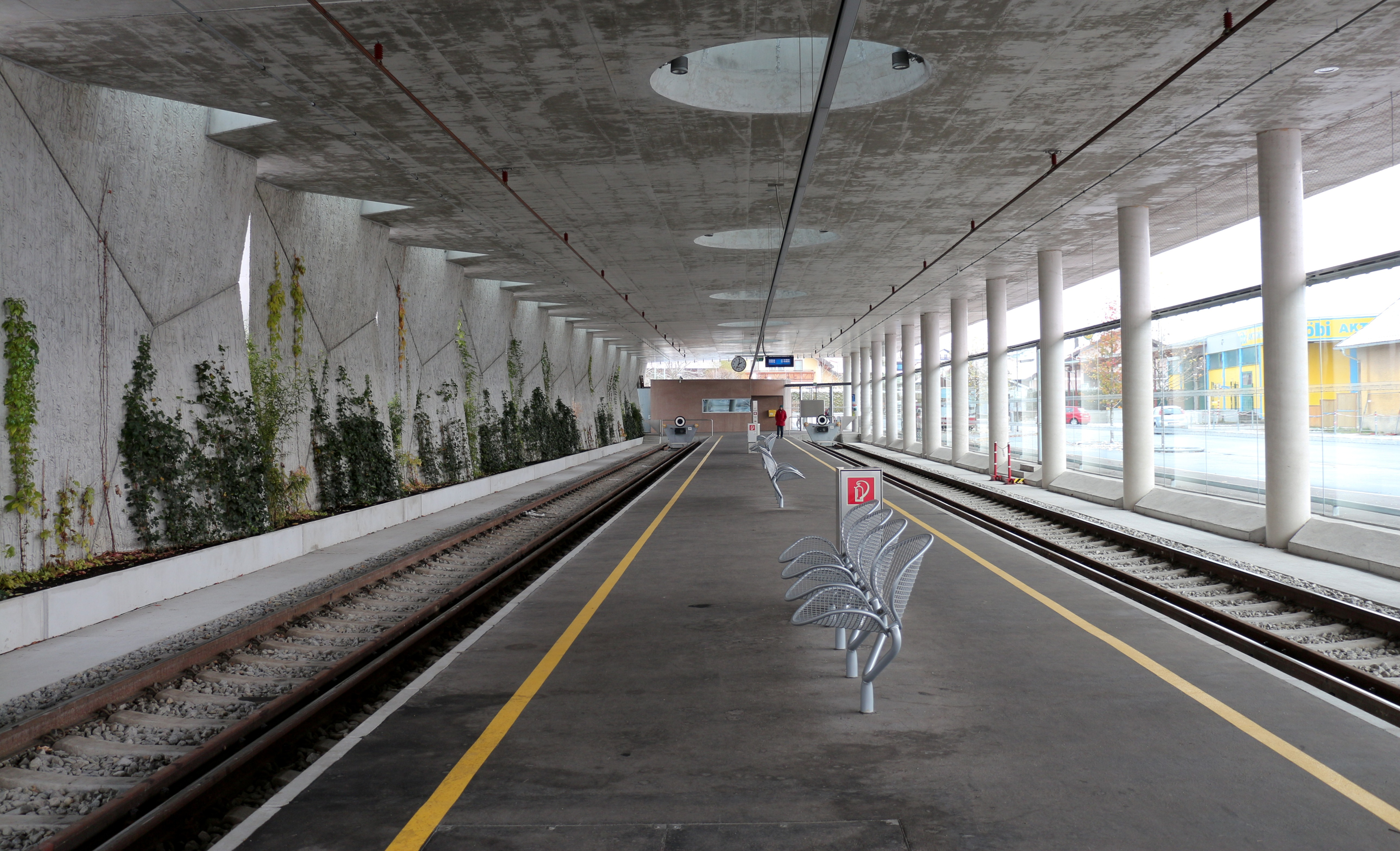 Der 2012 eröffnete Lokalbahnhof Lamprechtshausen, Endhaltestelle der Salzburger Lokalbahn.